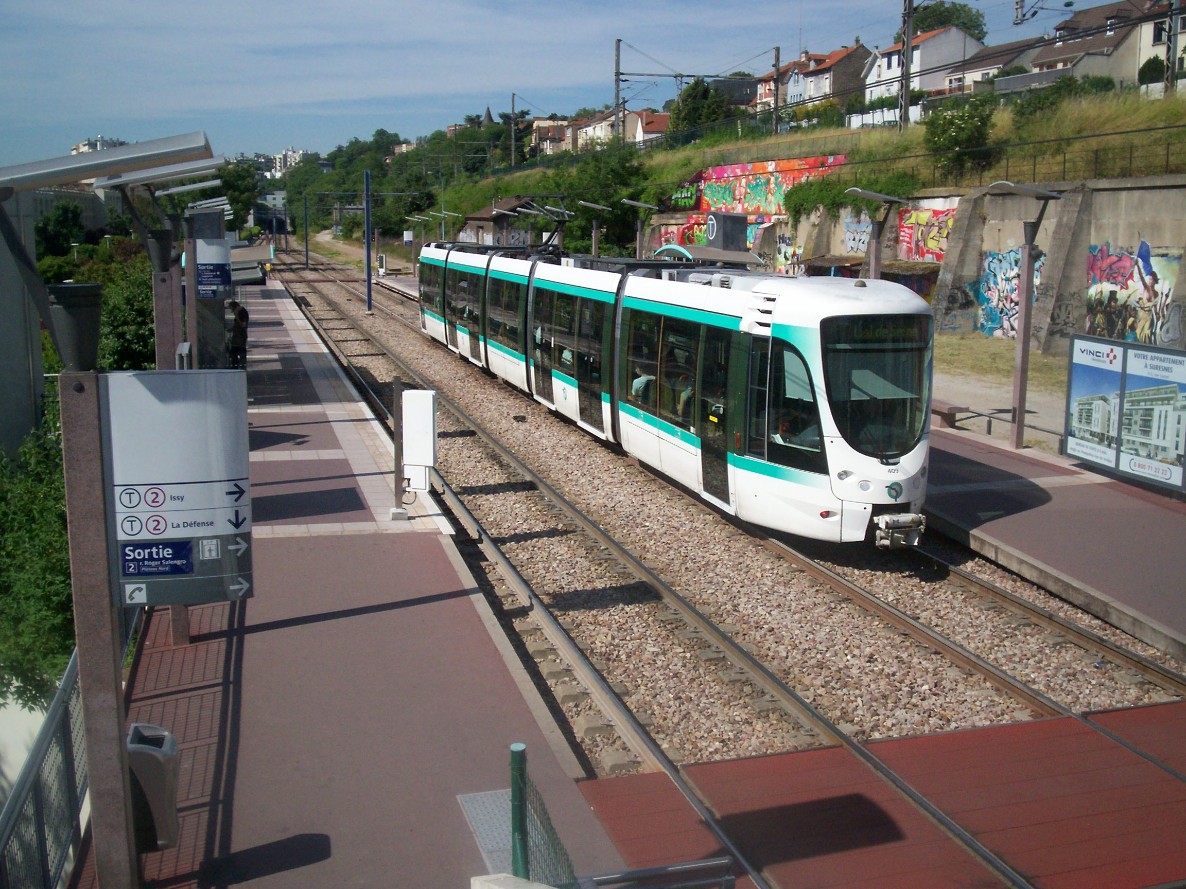 Paris Tramway ligne 2